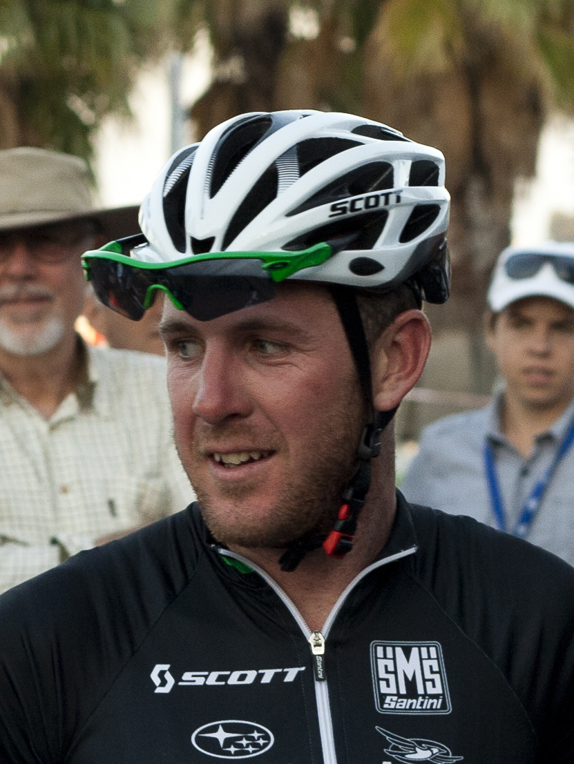 Matt Goss